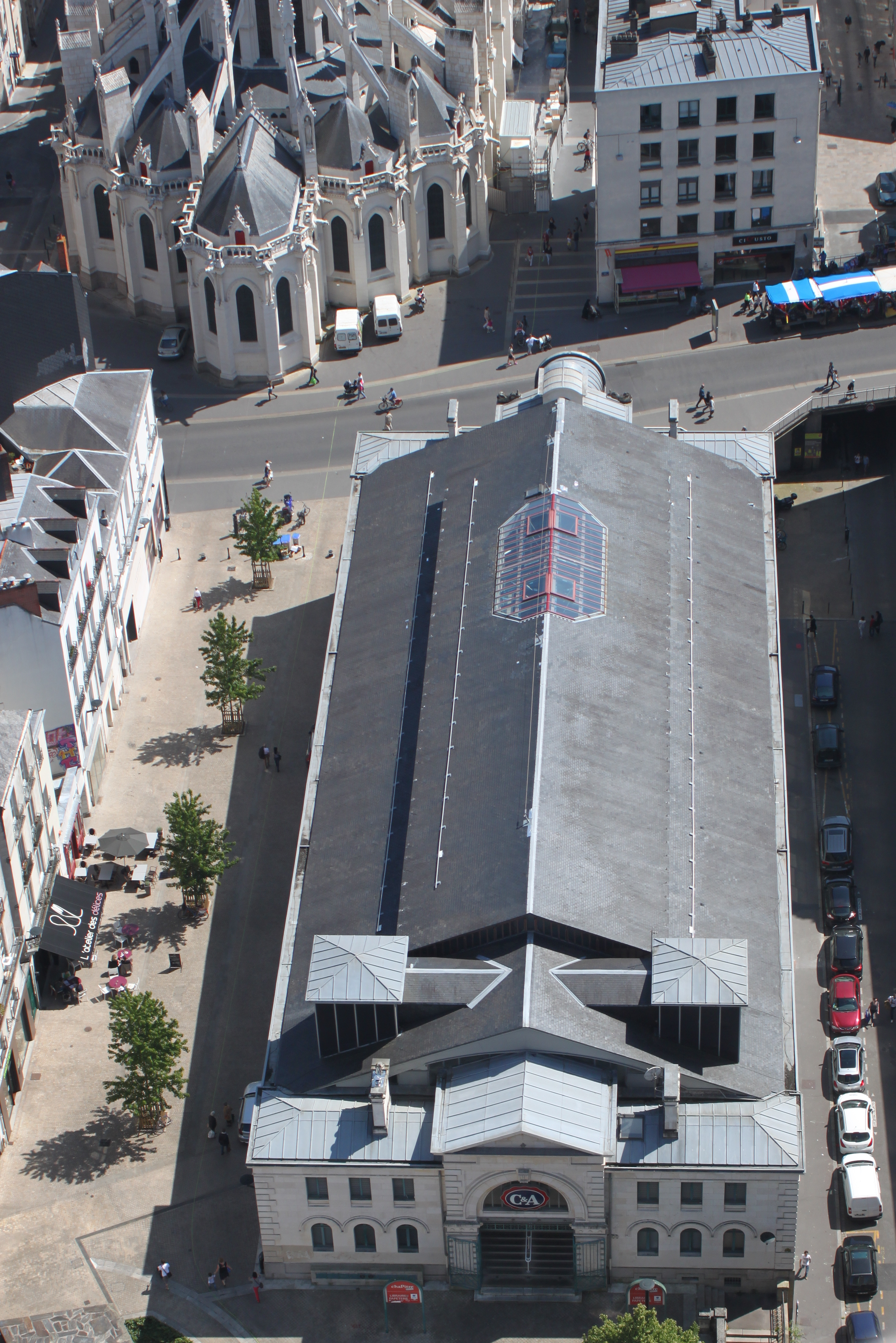 Marché de Feltre, Fr-44-Nantes.